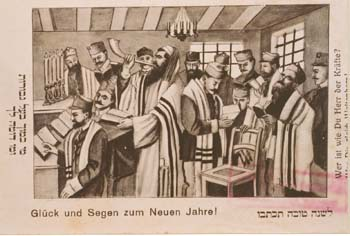 Jewish Soldiers Prayer in Rosh Hashanah WW1